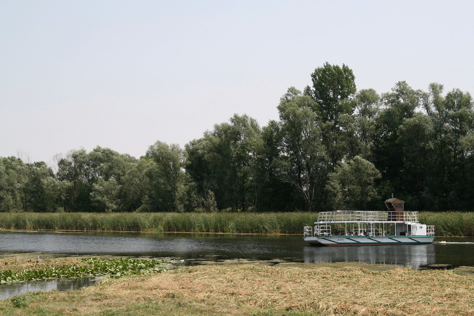 Bateau pour touriste sur la rivière Zasavica